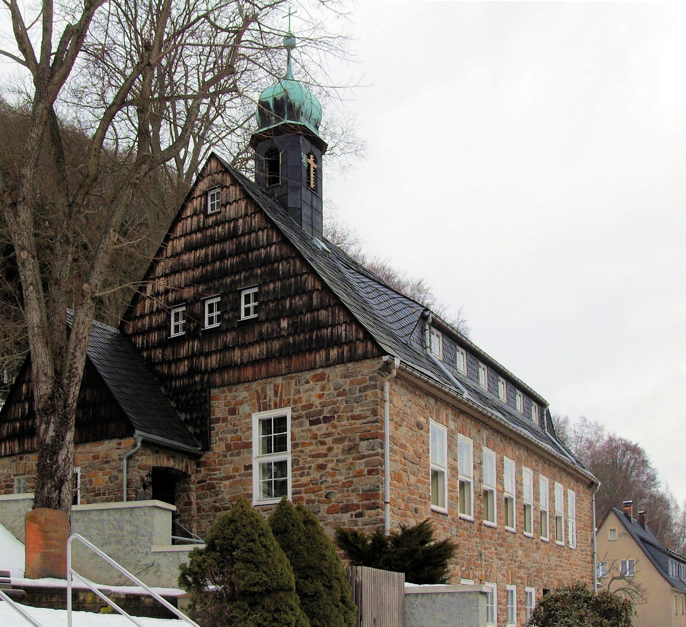 Stephanuskapelle in Rothenthal, Stadt Olbernhau, Erzgebirgskreis, Deutschland